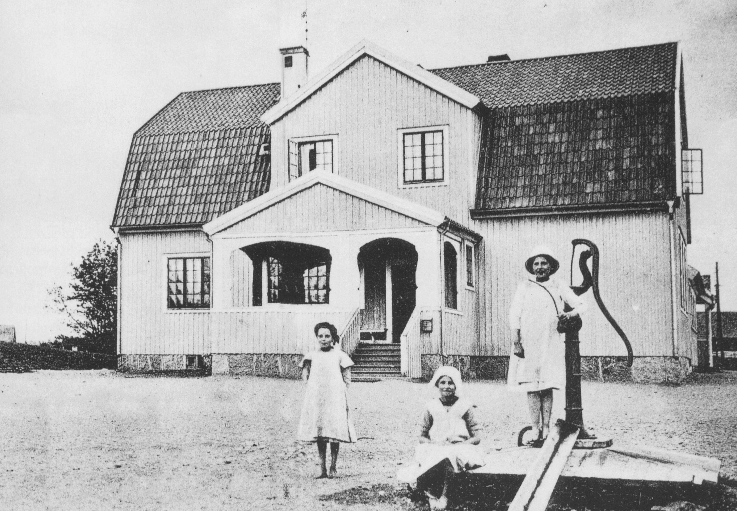 Huddinge kyrkskola, invigd 1914